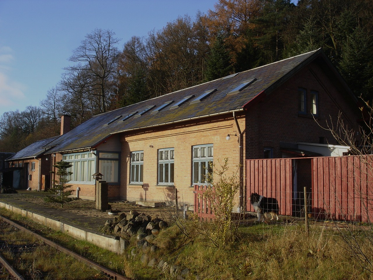 Funder Station fra Ø